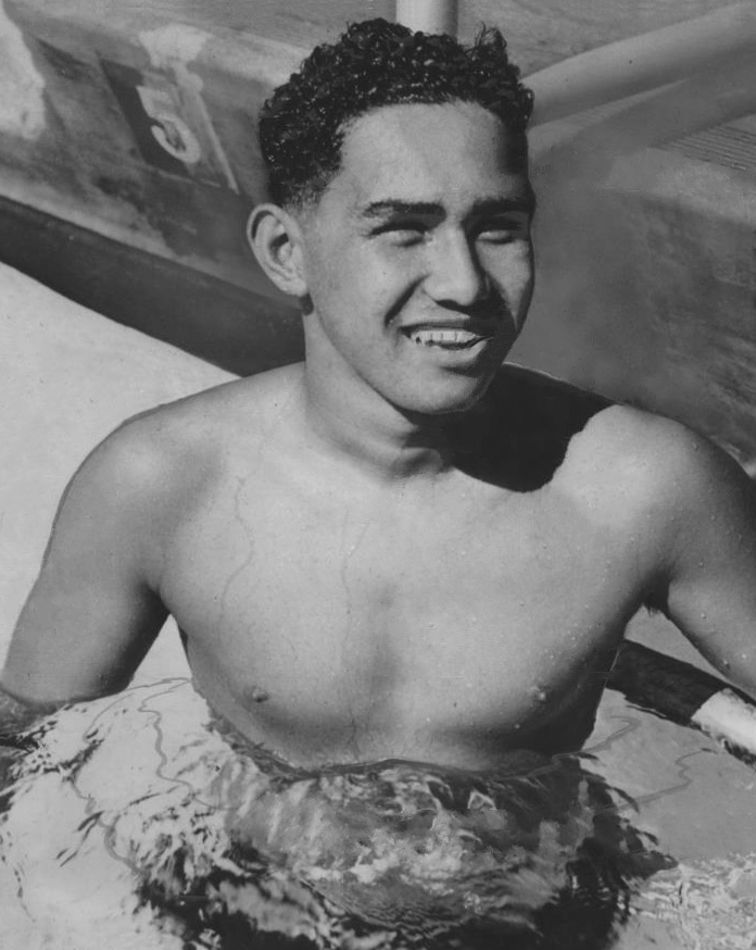 1941 PRESS PHOTO SWIMMER BILL SMITH, JR ARRIVES IN US FOR NATIONAL AAU MEET